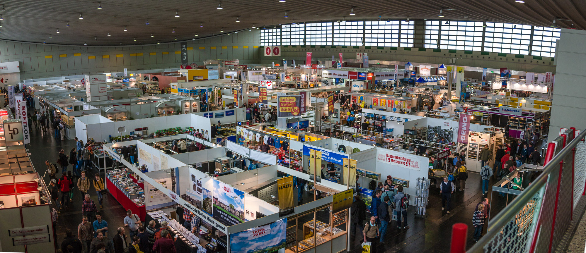 Halle 4 der 35. Intermodellbau (2013) zeigt Modelleisenbahnanlagen.